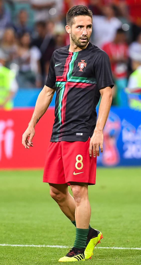 Хет-трик Роналду приносит Португалии ничью в пиренейском дерби